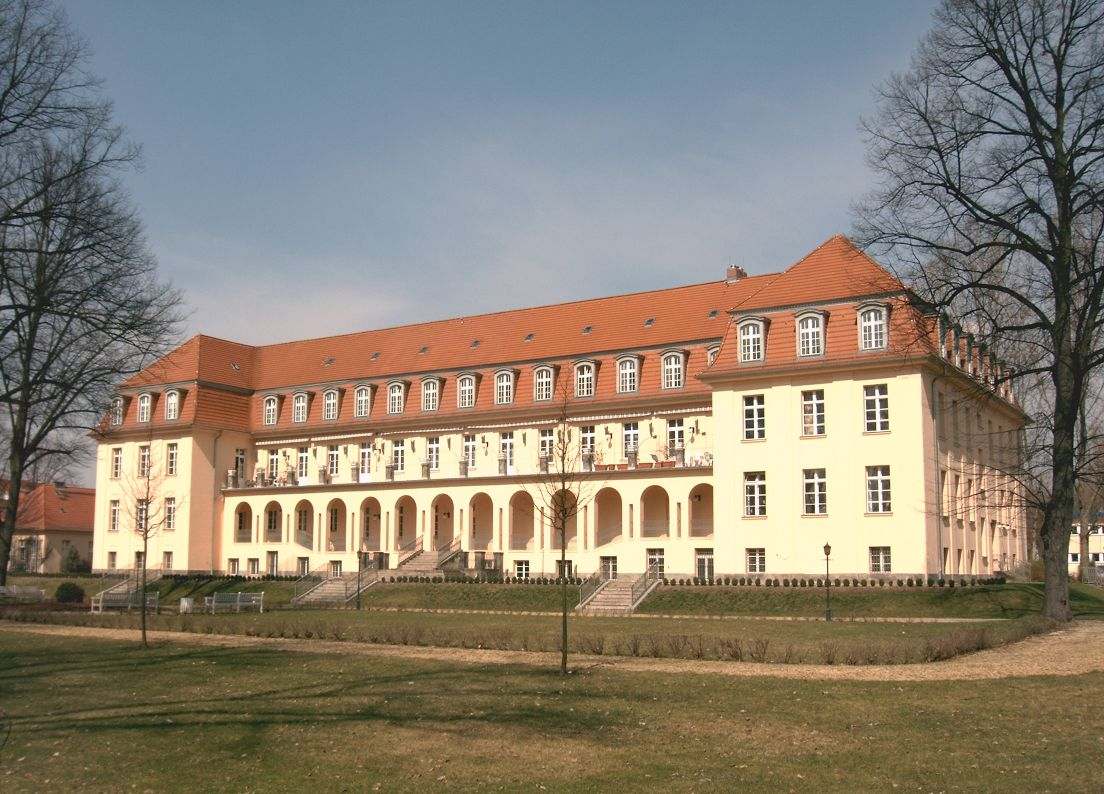 Rehabilitationszentrum "Janus Korczak" in Berlin-Blankenburg.